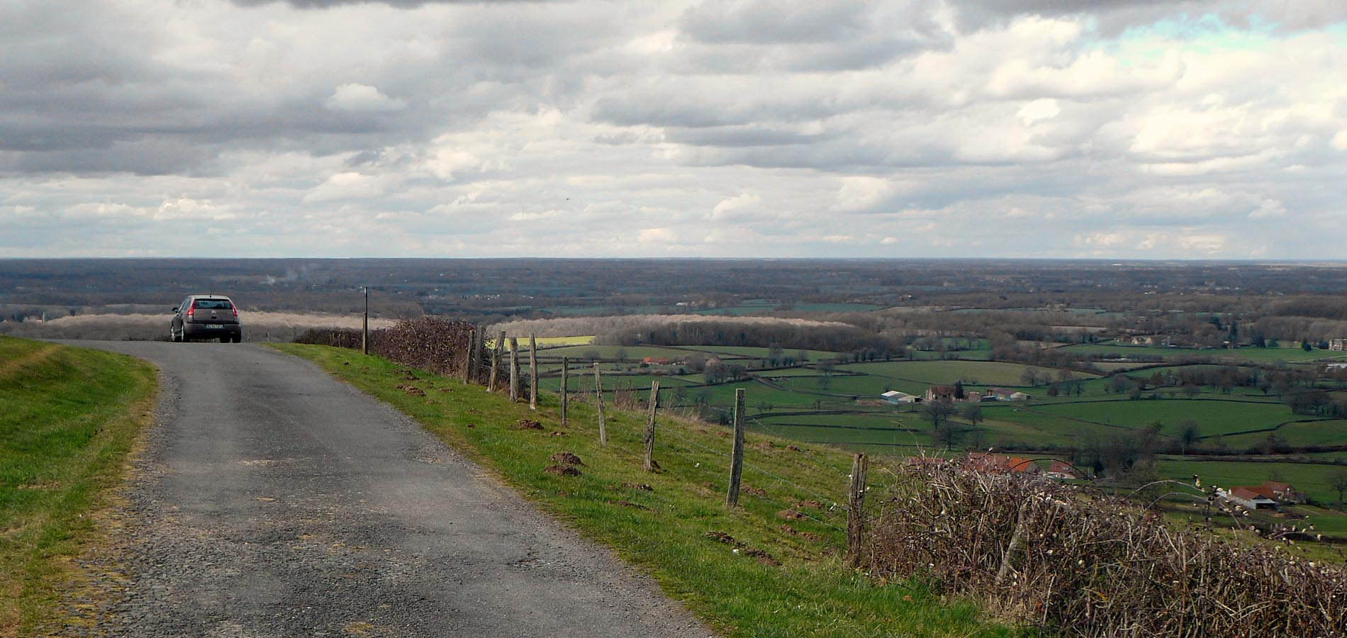 Vue prise le 6 mars 2018 du haut du Puy Saint-Ambroise, commune de Saint-Léon dans l'Allier